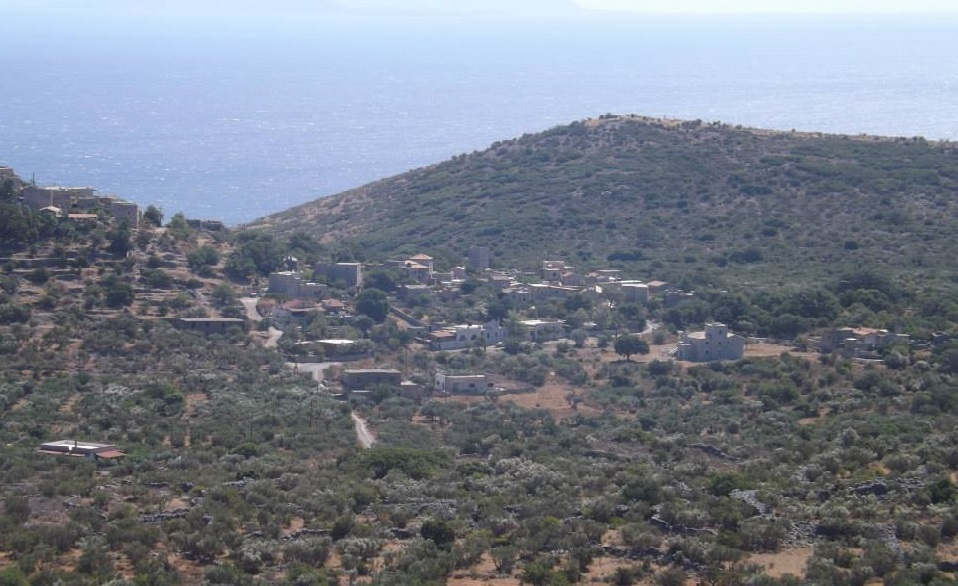 Πιόντες Ανατολικής (Προσηλιακής) Μάνης